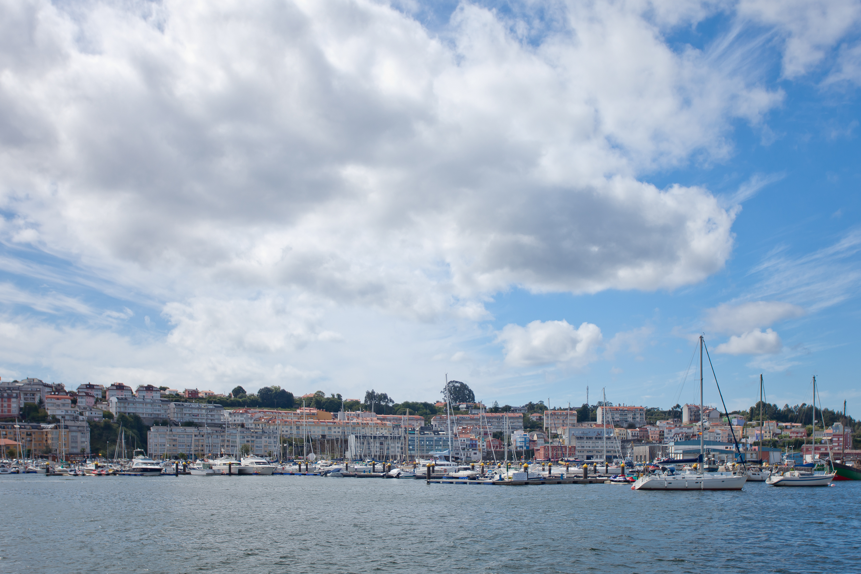 Porto de Sada, Galicia (Spain).